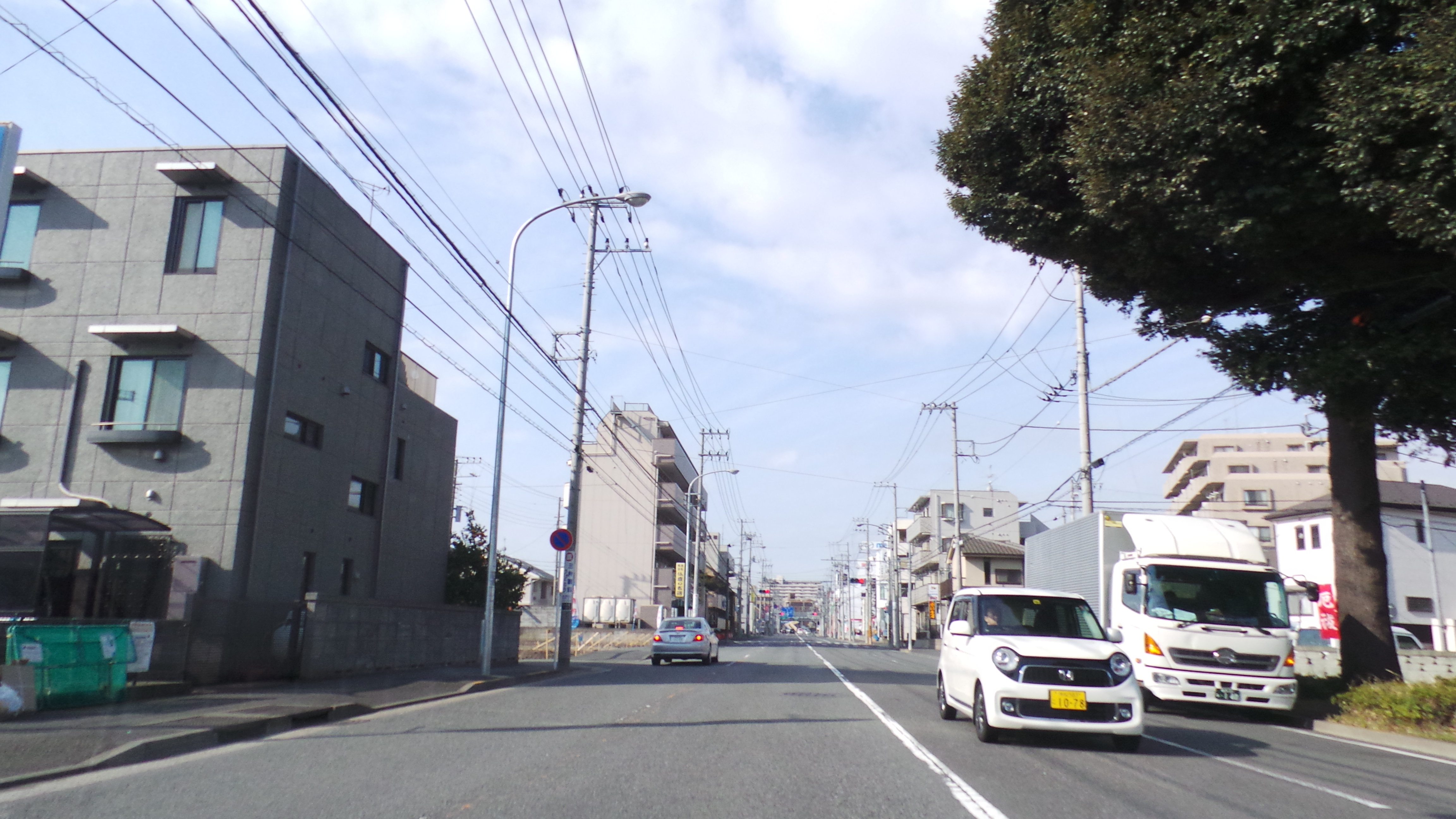 Shikimidai, Asahi Ward, Yokohama, Kanagawa Prefecture 241-0025, Japan